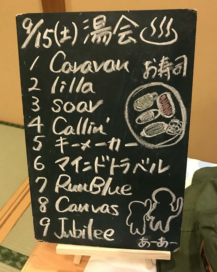 amiinAセトリボード(20180915(1))